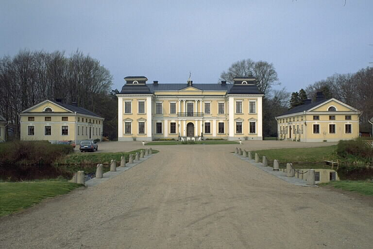 Exteriör, entrésidan. Motiv: Skottorps slott Nyckelord: Byggnadsminnen, Riksintressen Kategori: Slott Exteriör, entrésidan. Skottorps slott.